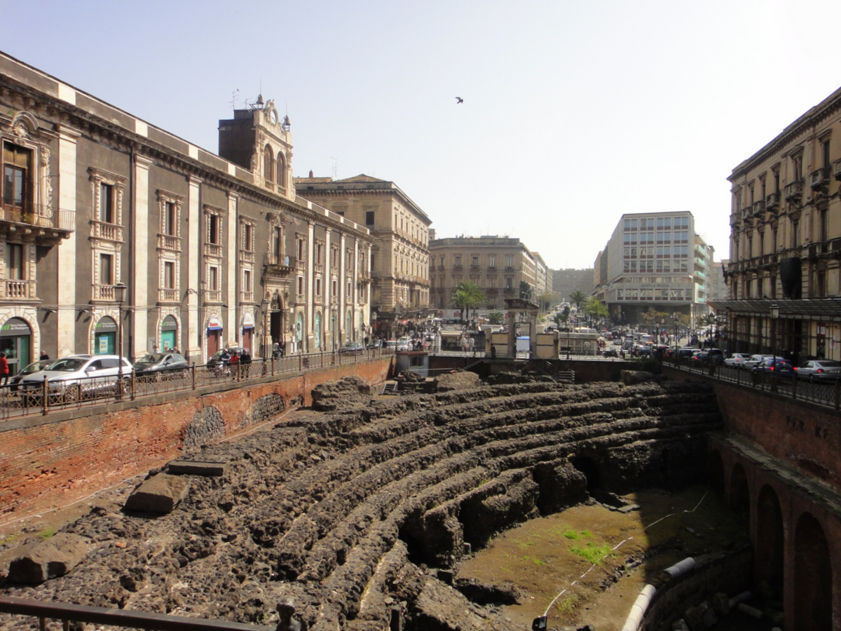 Catania